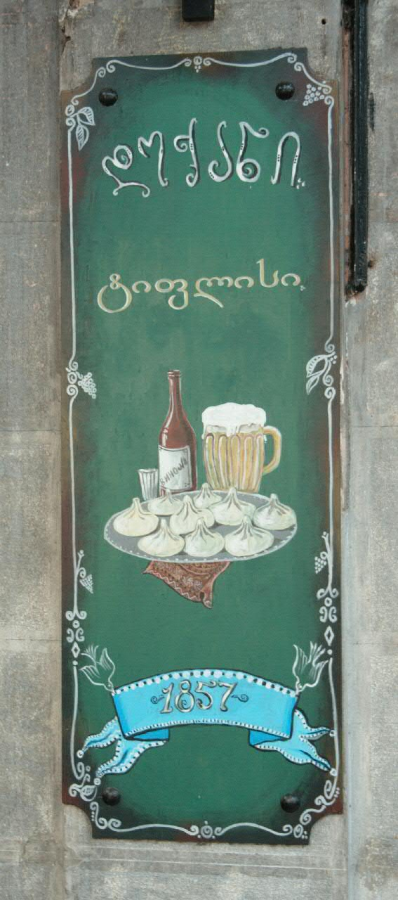 enseigne